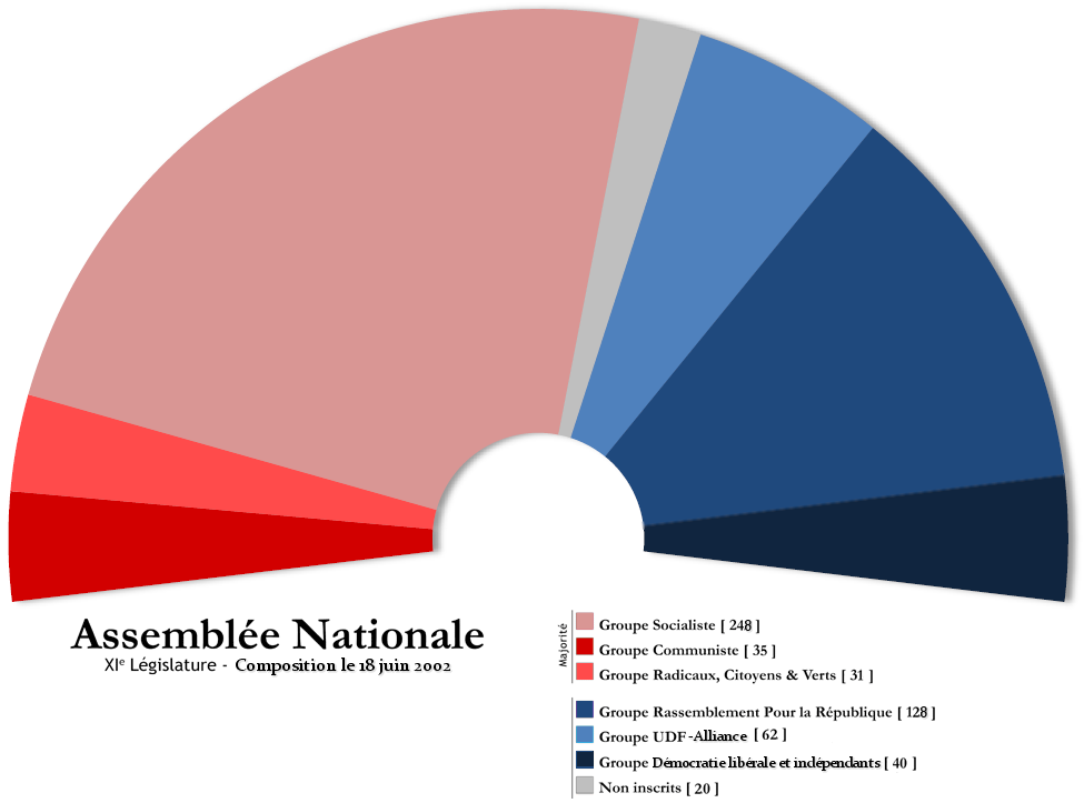 Assemblée Nationale française : composition par groupes politiques le 18 juin 2002